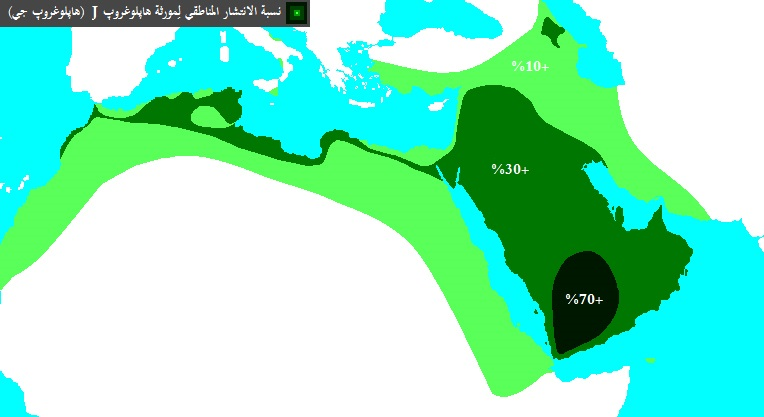 انتشار مورثة هاپلوغروپ J1.